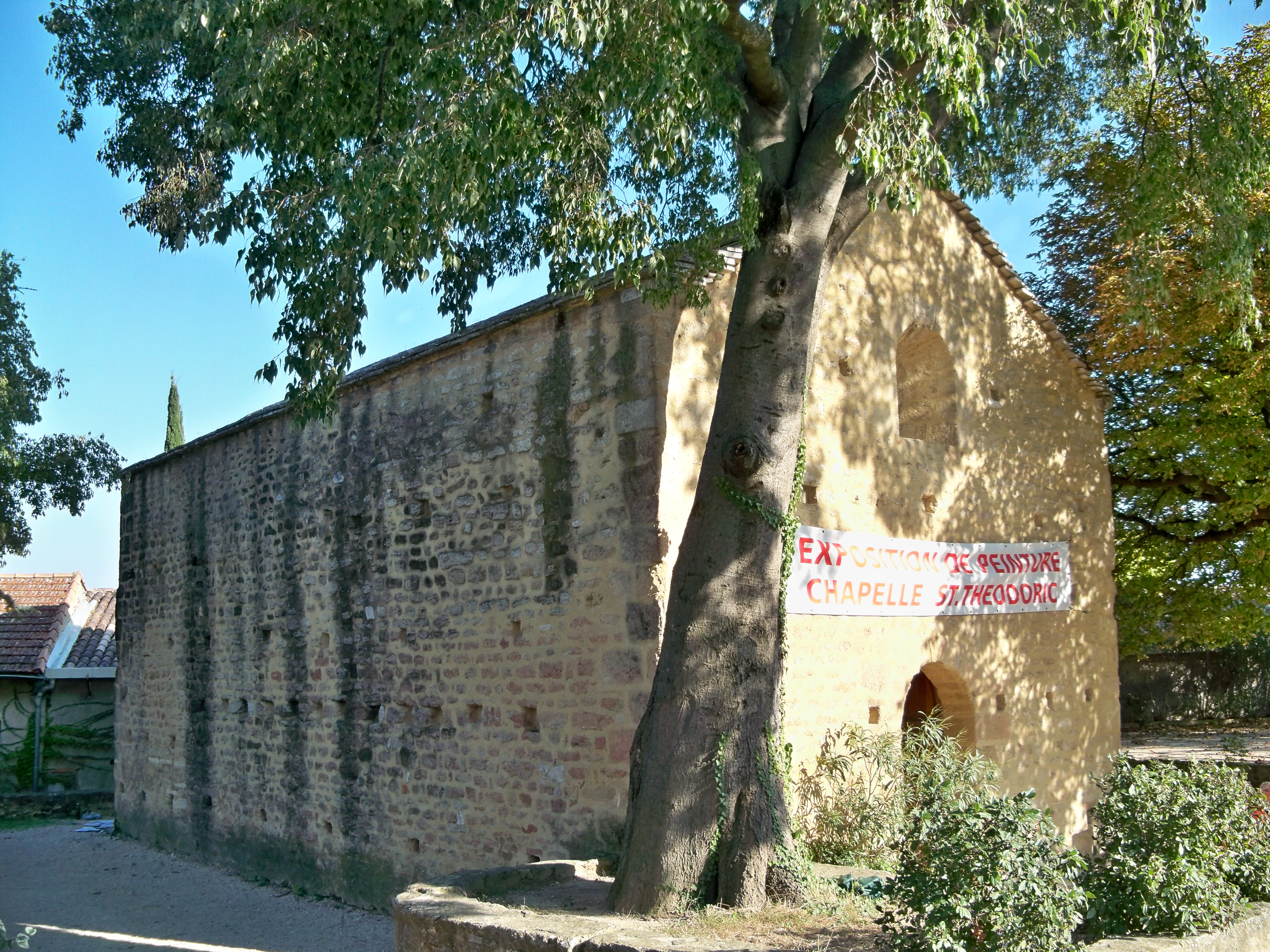 Chapelle Saint Théodoric de Chateauneuf du Pape (84) .